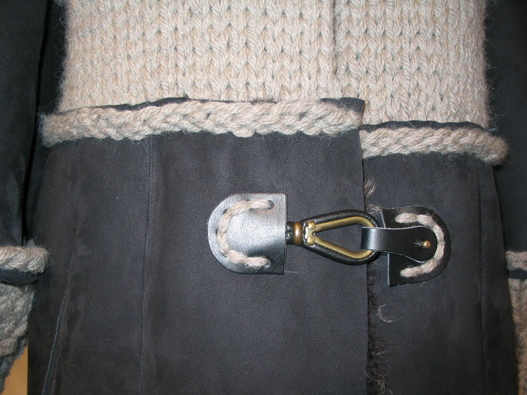 Offenkantige Pelzverarbeitung (Lamm) mit Strick und Karabineröse . Gesehen auf der Ausstellung der prämierten Teile des Internationalen Designwettbewerbs des deutschen Kürschnerhandwerks, anlässlich der Pelzmesse in Frankfurt am Main 2008.